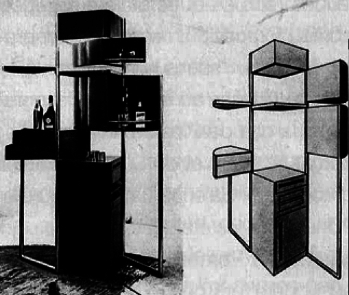 Guillemard Marcel, Meuble bar en métal, Retrospective Marcel Guillemard, Mobilier et décoration, n°1, janvier 1933, p. 251